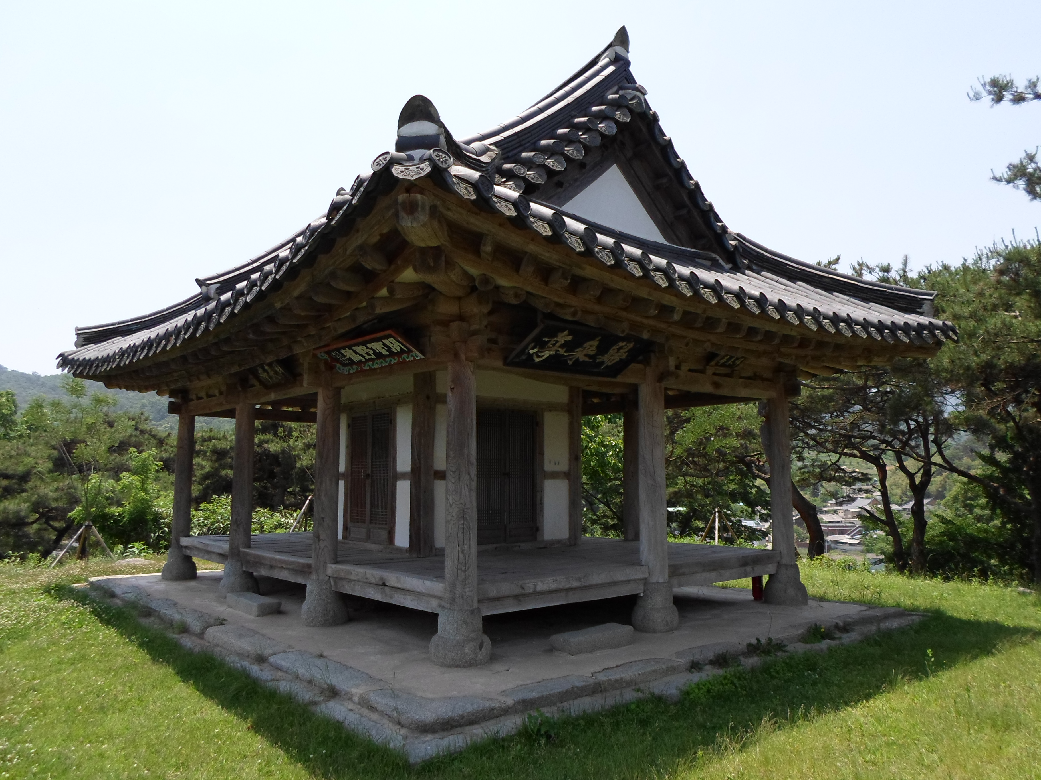 전라북도 문화재자료 제67호 귀래정(歸來亭).